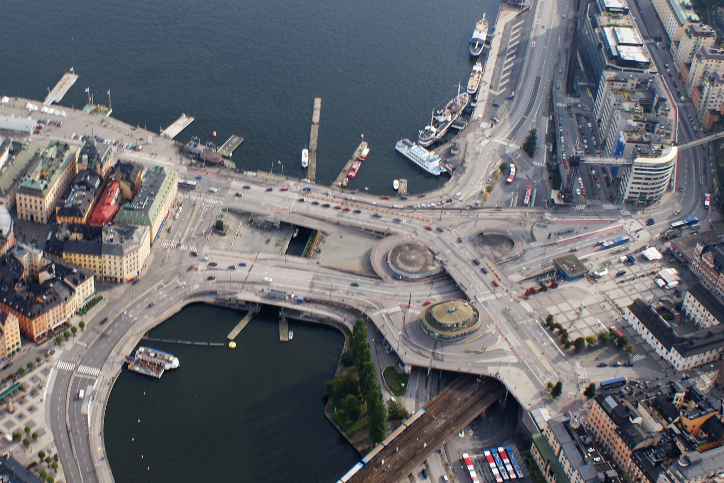 Slussen sedd från helikopter.